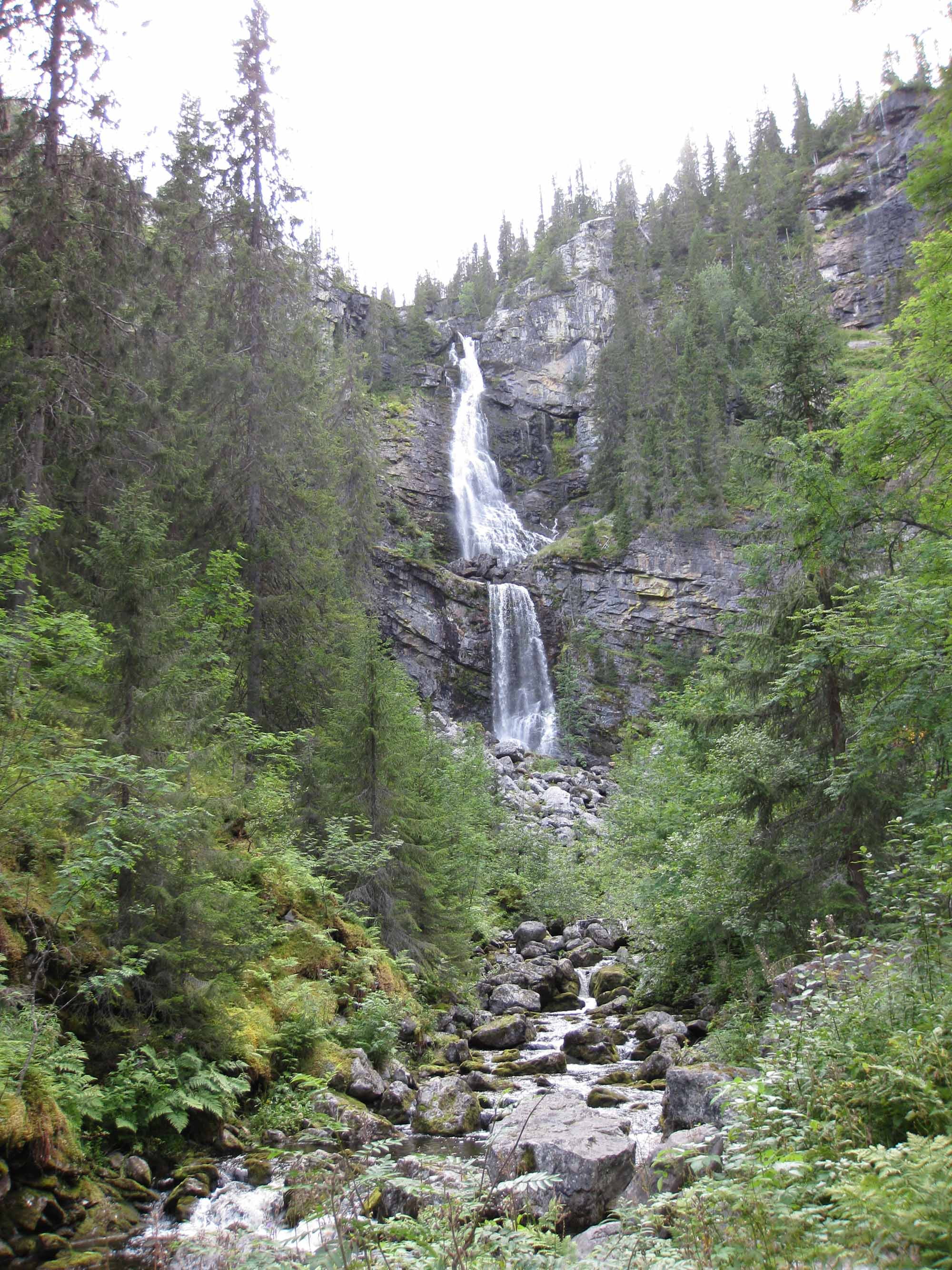 Fettjeåfallet vid Klövsjö